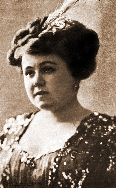 Ни́на Ви́кторовна Дульке́вич (в девичестве Бабу́рина; 1891, Петербург — 1934, Ленинград) — российская и советская эстрадная певица (меццо-сопрано), исполнительница романсов, цыганских и русских народных песен